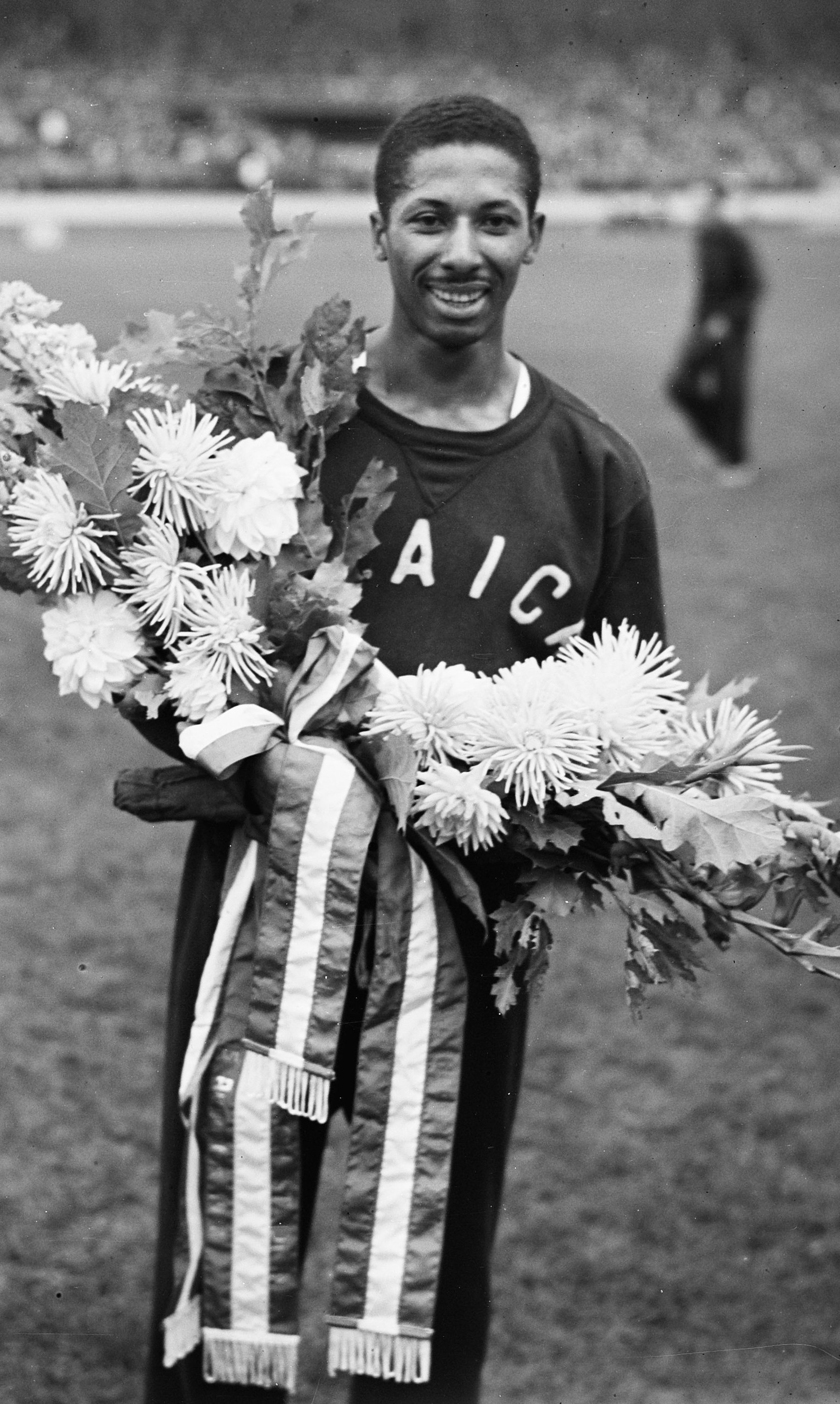 Internationale Atletiekwedstrijd in het Olympisch Stadion. McKenley met bloemen